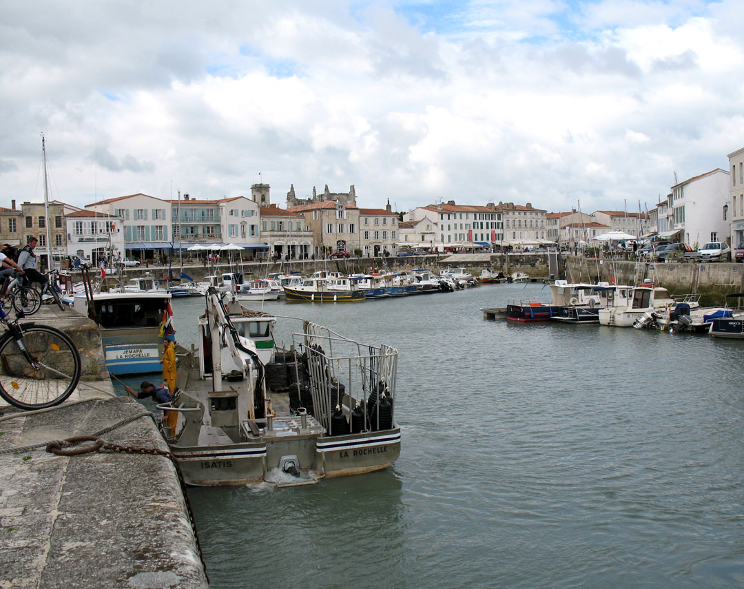 St-Martin-de-Ré, Île de Ré, France